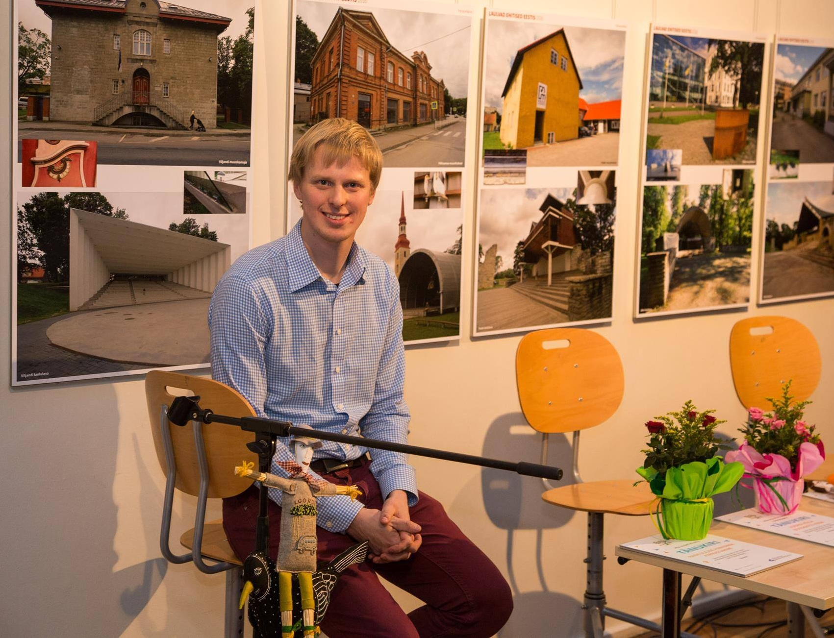 Ühisnädal 2016, Paides